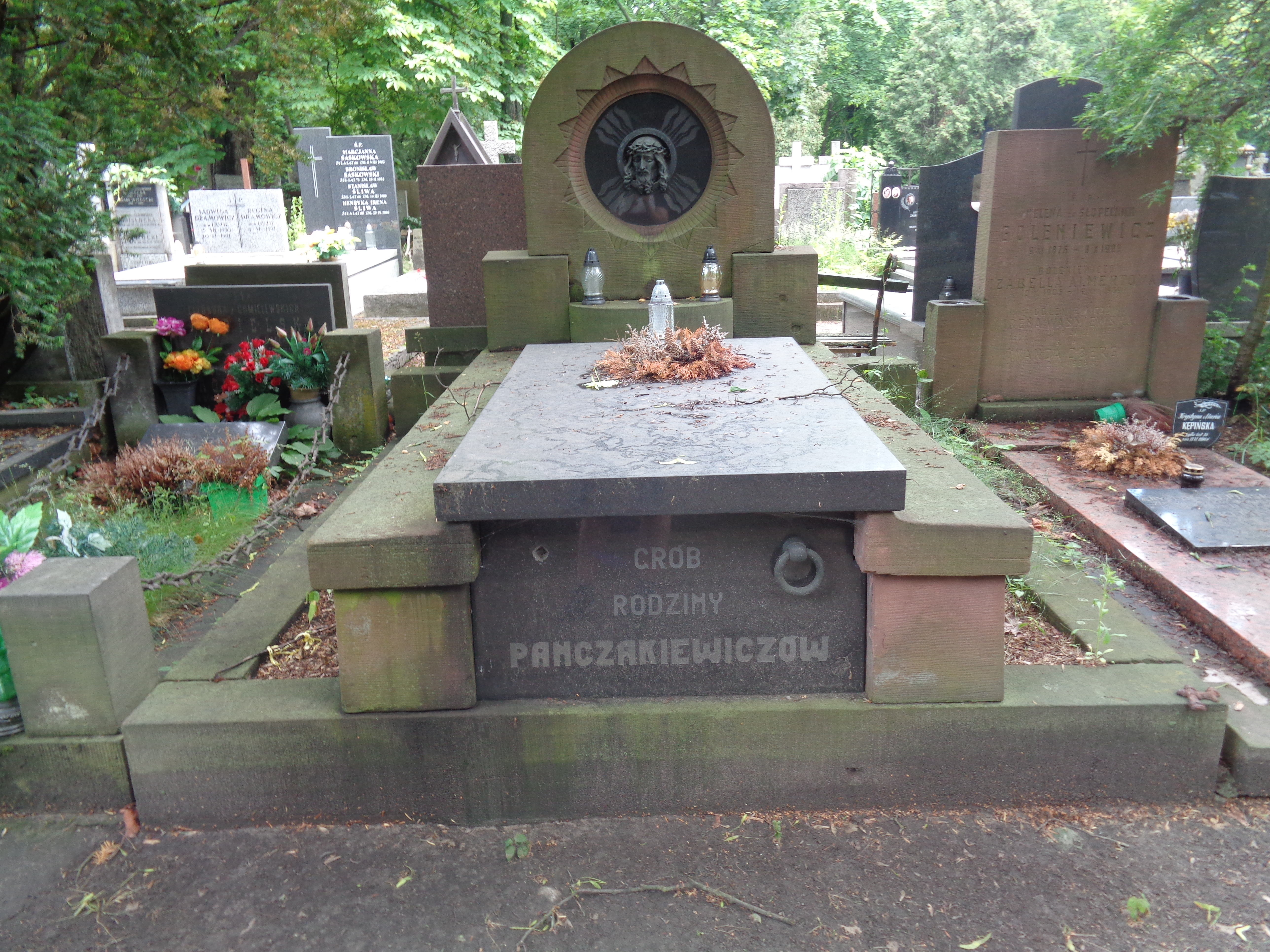 Grób Stanisława i Ludwika Panczakiewiczów na Cmentarzu Powązkowskim